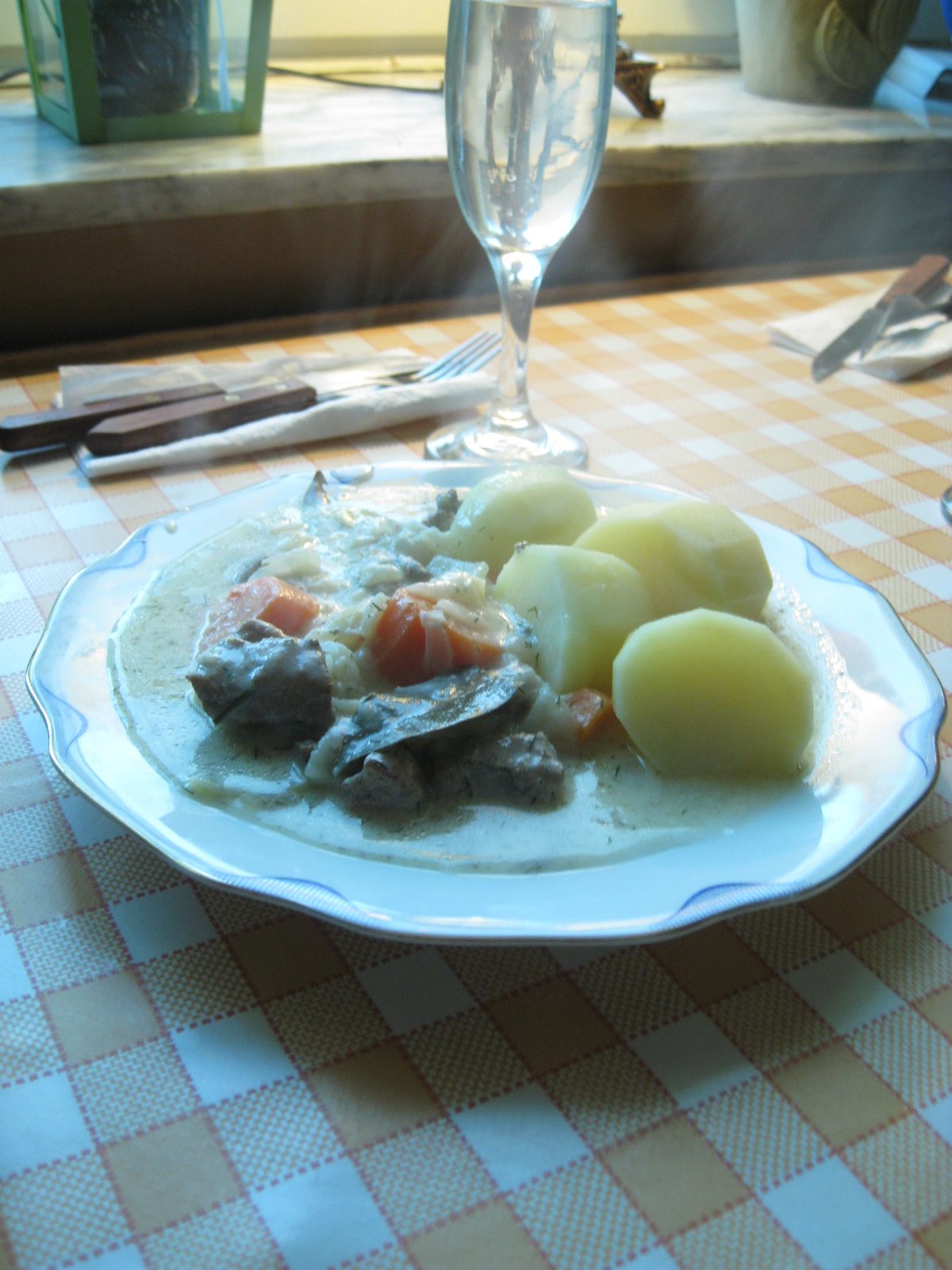 Per Morbergs Klassiska Dillkött